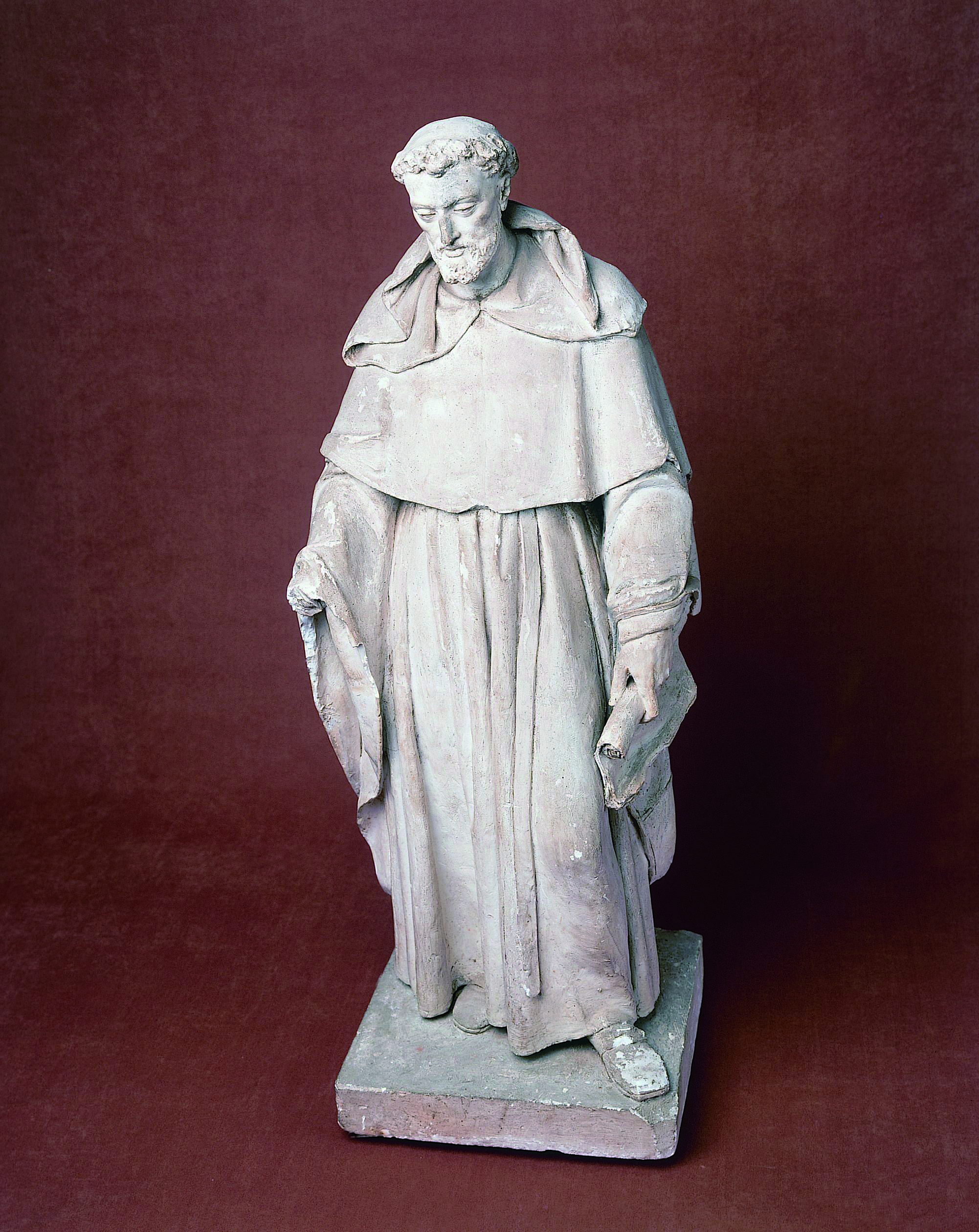 Esta obra es un boceto realizado en yeso de la escultura de Fray Luis de León ubicada en el Patio de Escuelas de Salamanca, (España).